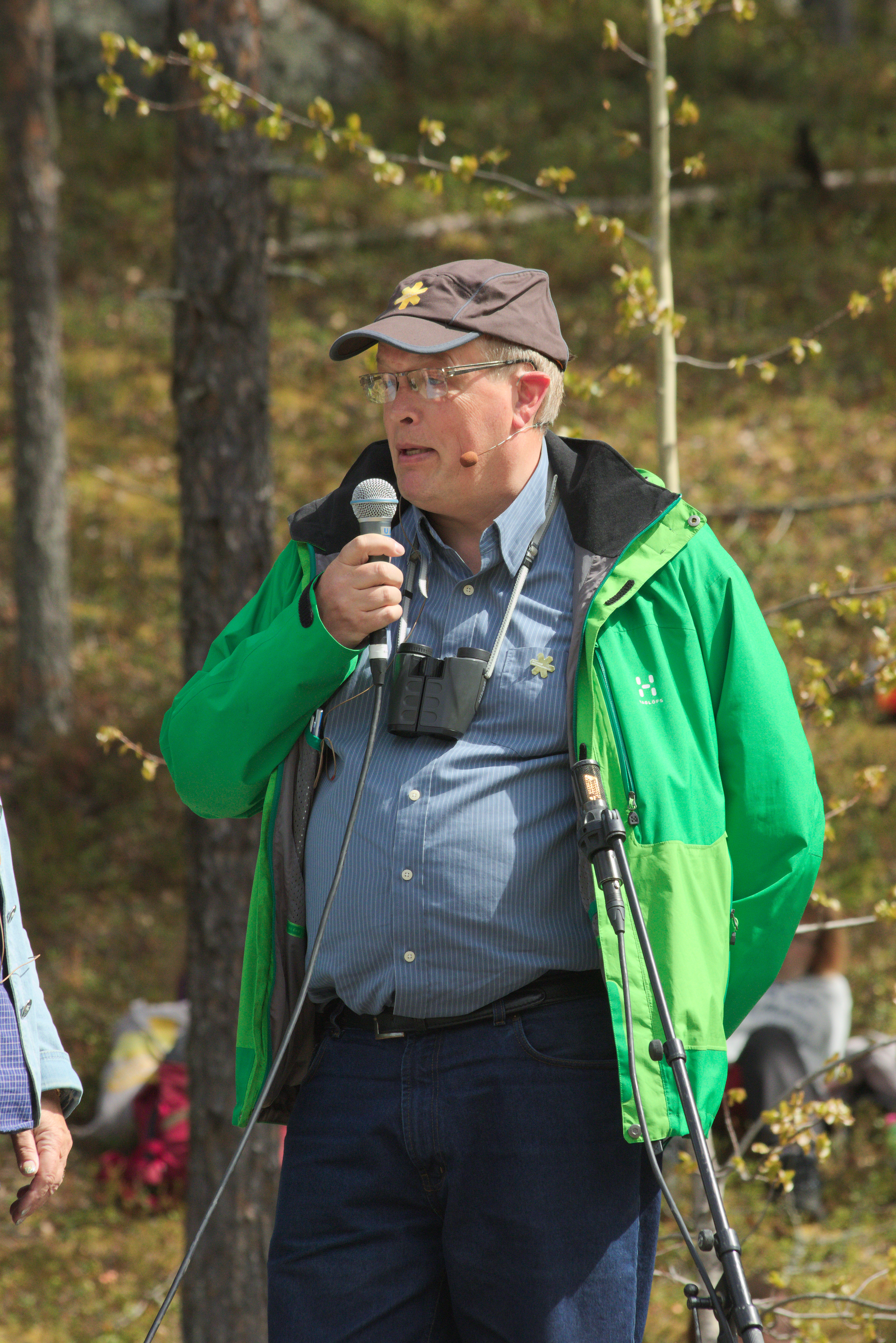 Naturvårdsverkets generaldirektör Björn Risinger under invigningen av Björnlandets utvidgade nationalpark